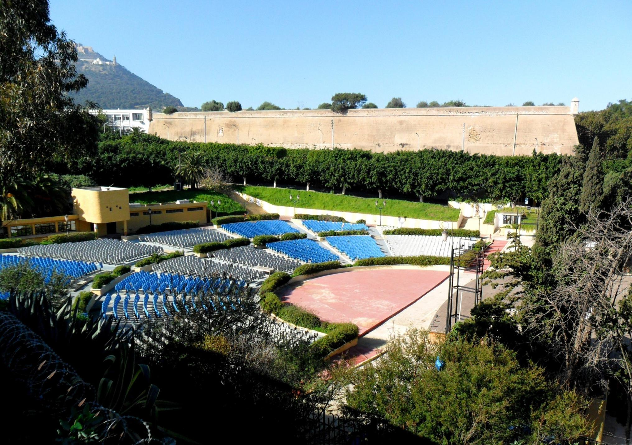 Le théatre de verdure مسرح الهواء الطلق - وهران